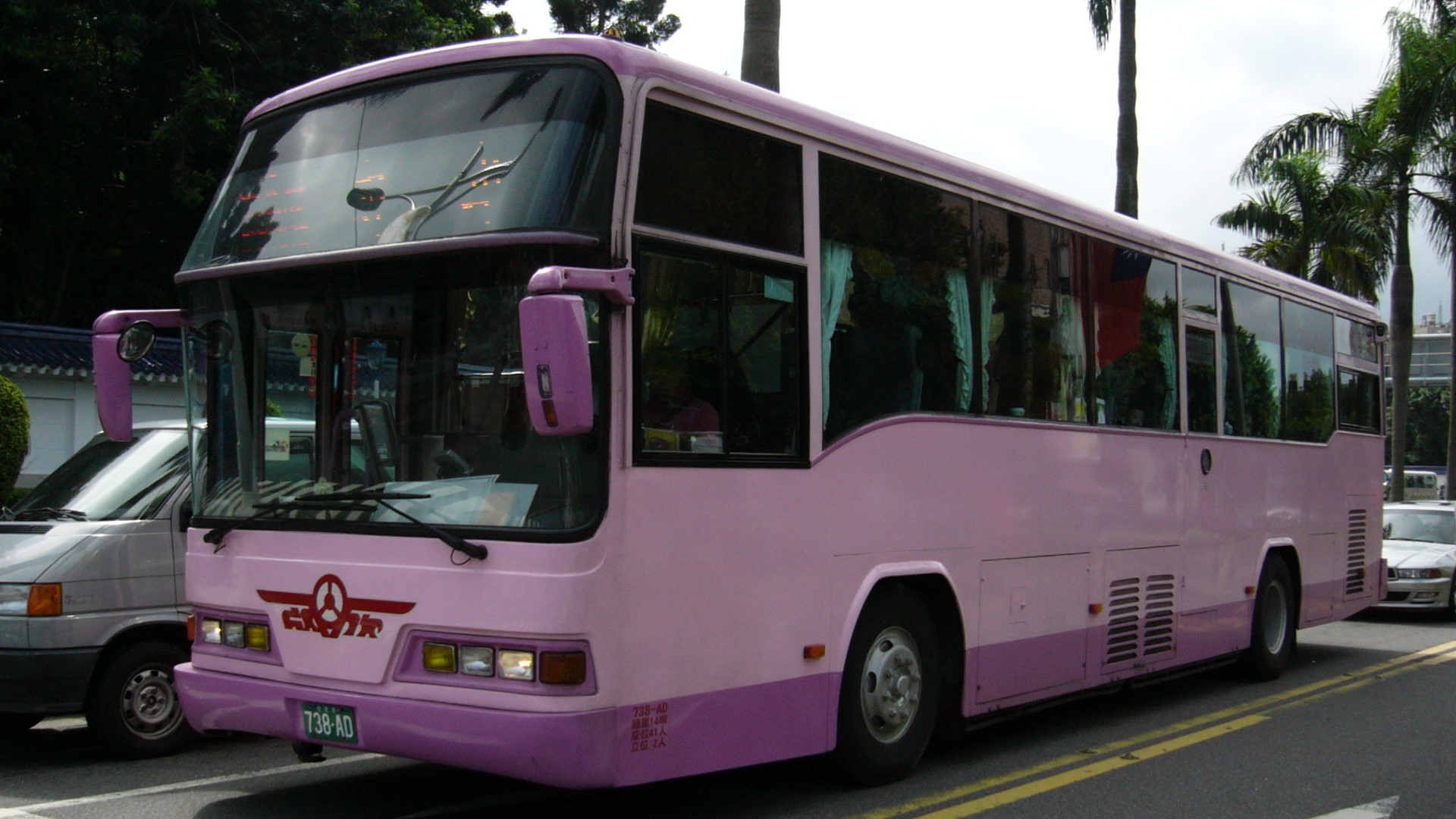 欣欣客運738-AD左前方外觀